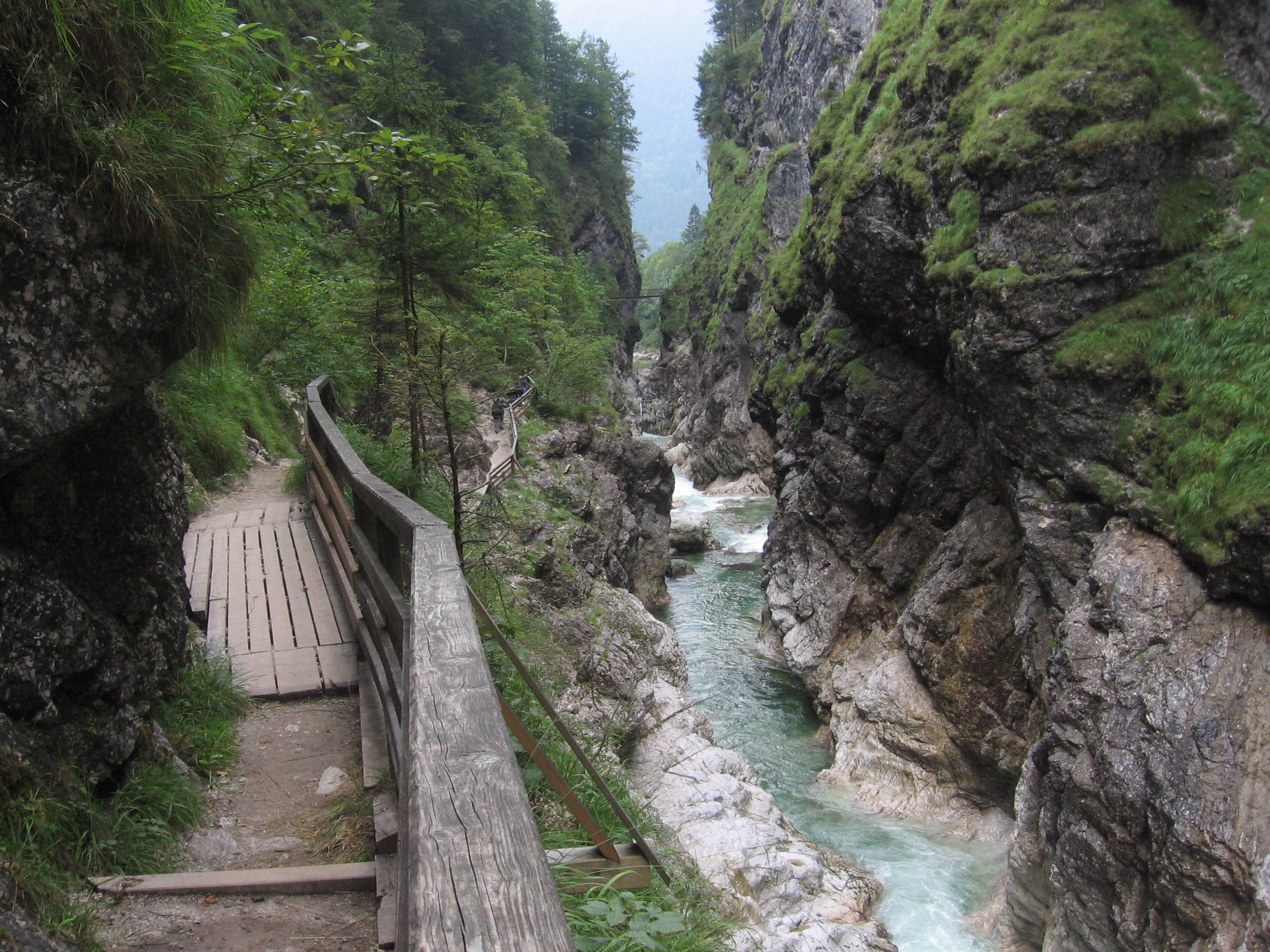 Lammeröfen